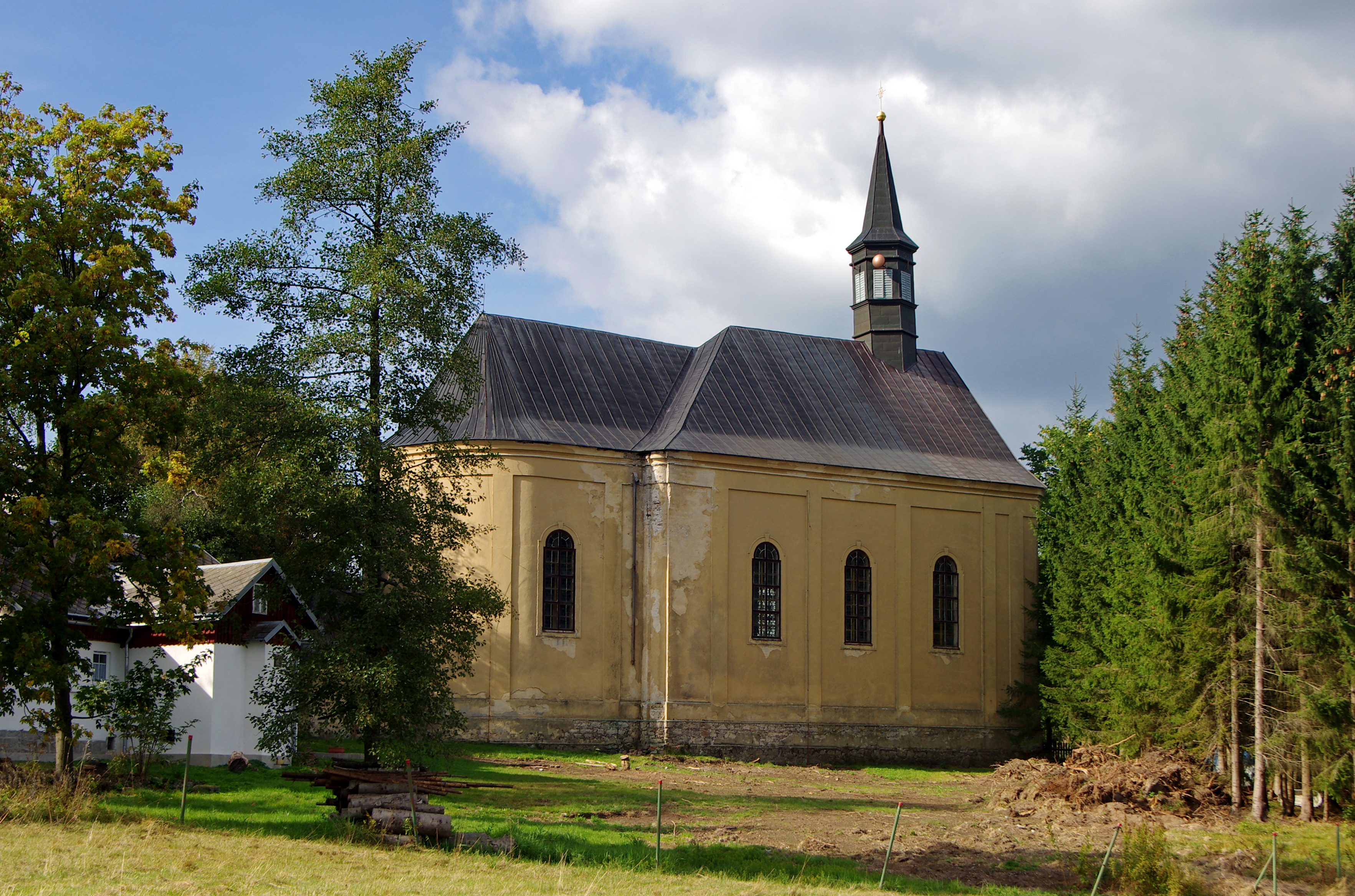 Kostel svatého Bartoloměje, Přebuz.